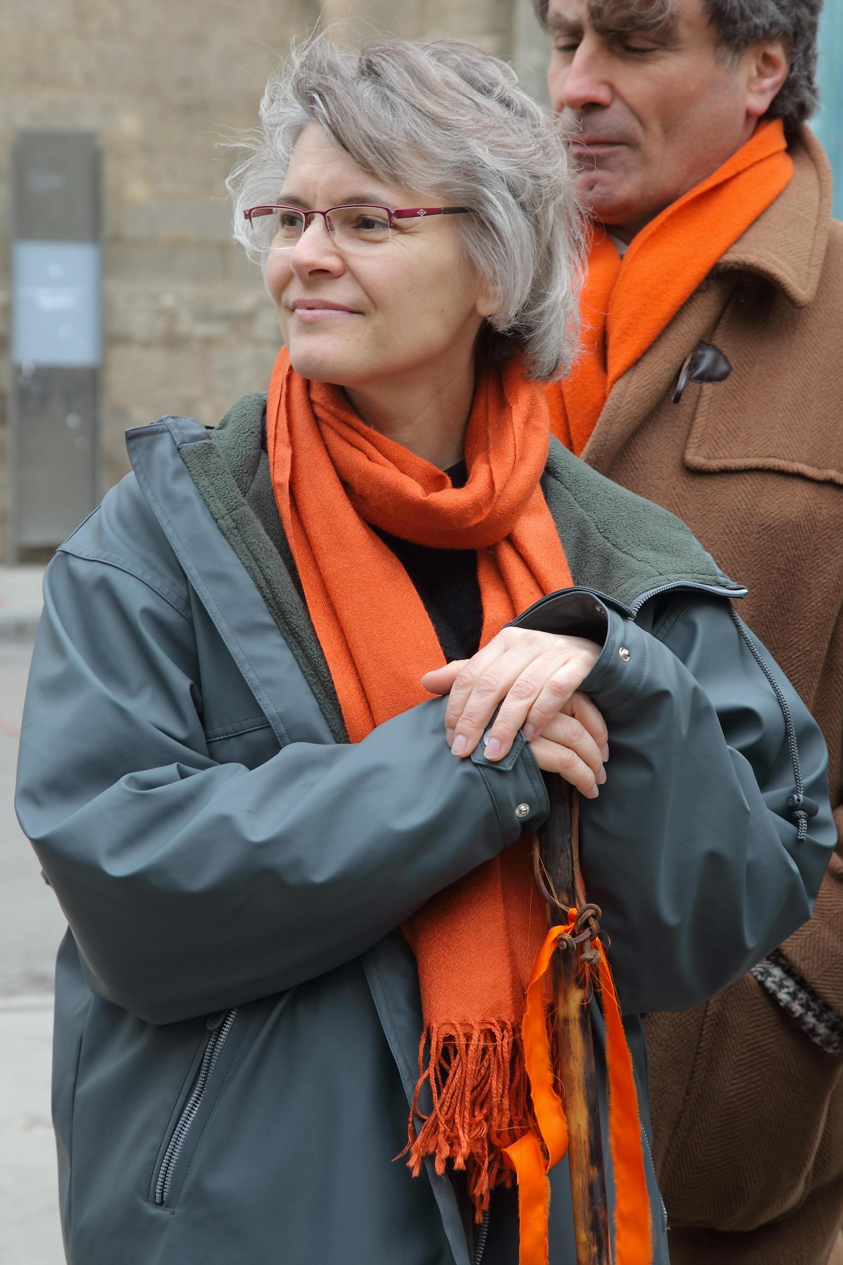 Catherine Levraud, tête de liste MoDem aux élections régionales de 2010 en PACA, lors de la marche à Arles